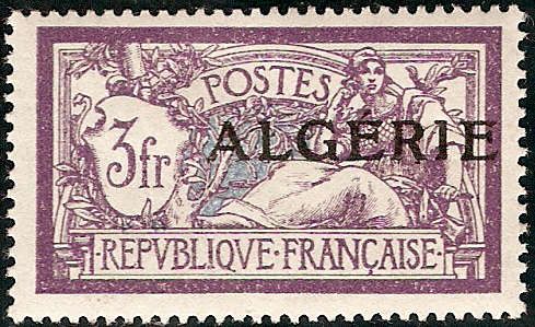 Timbre d'Algérie au type Merson de 1924